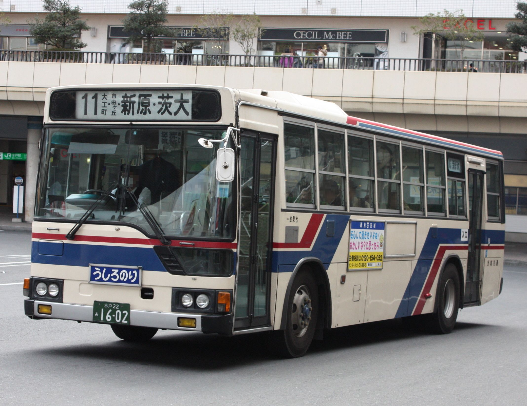 茨城交通 車番1602 U-MP218M 水戸駅北口にて